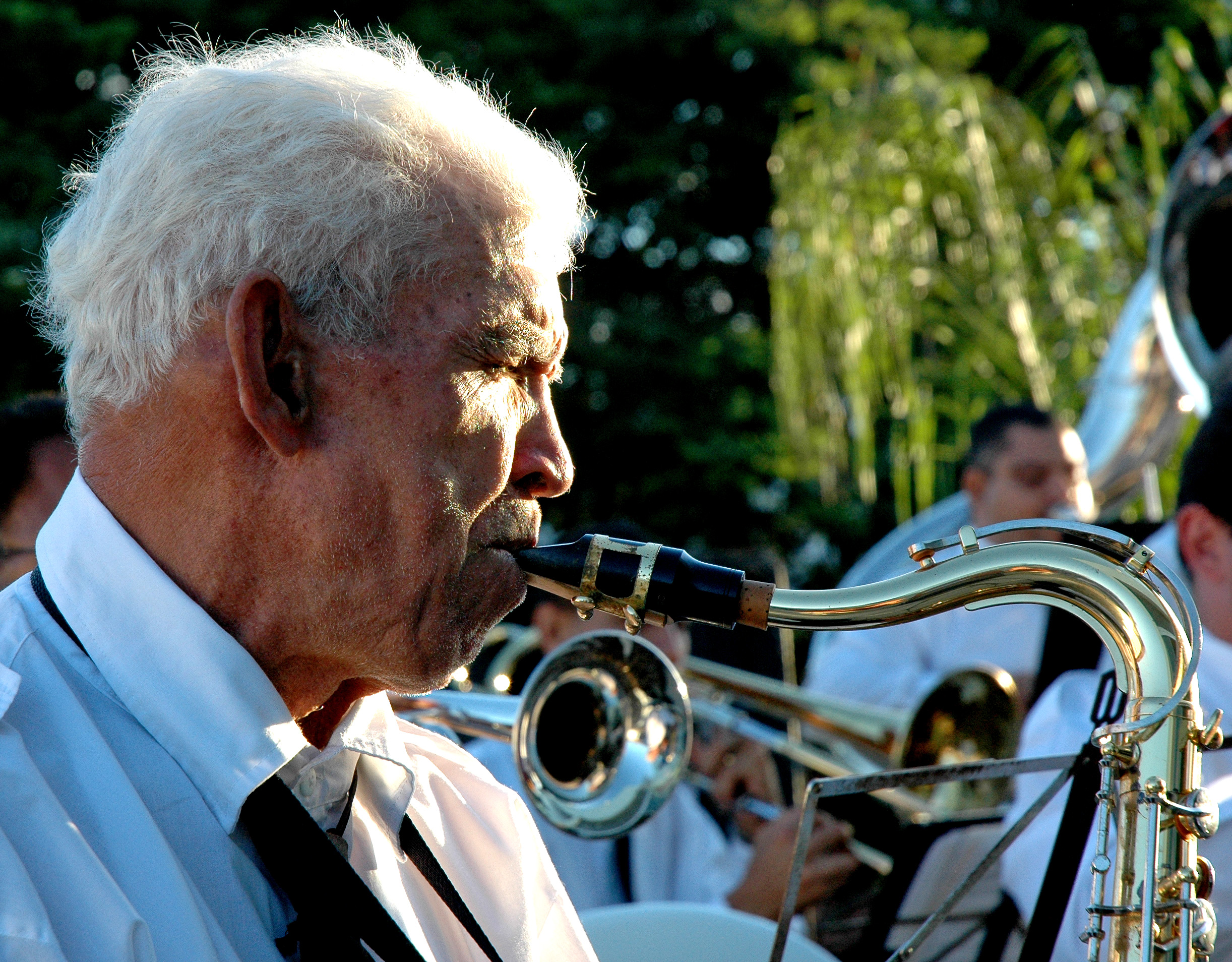 Fotografia da Corporação Musical Santa Cecília - Lagoa Santa/MG - Acervo da Prefeitura Municipal de Lagoa Santa (Foto de Chico Fotógrafo)